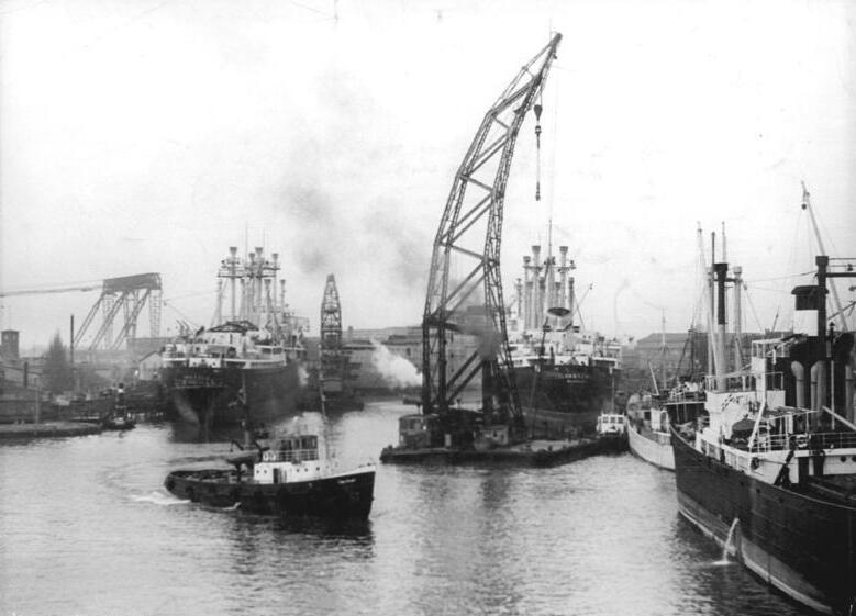 Rostock, Warnow-Werft, Ausrüstungshafen Zentralbild Mellahn Frö-Bra. 19.5.1958 Erfolgreiche Werftindustrie der DDR Fast 2000 Schiffe bis zu einer Größe von 10000 Tonnen wurden bisher in den nach 1945 mit sowjetischer Hilfe entstandenen Schiffbaubetrieben der DDR gebaut und ausgerüstet. Allein die Hochseewerften an der Ostseeküste der DDR werden in diesem Jahr etwa 120 Handels- und Fischereifahrzeuge sowie Passagierschiffe bauen. UBz: Blick auf das rege Leben im Ausrüstungshafen der Warnewerft, dem größten Schiffbaubetrieb der DDR.